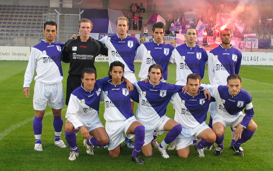 Ploegfoto van Patro Eisden Maasmechelen met bovenaan staande en v.l.n.r. Marco Caramel, Davy Heilmann, Bjorn Bleux, Marco Battista, Abdellah Echarki, Soeris Baidjoe, hurkend: Boris Marolt, Mohammed El Idrissi, Dario Cagnazzo, Grégory Rondeux, Jurgen Vandeurzen